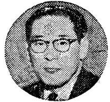 박동진 외교관, 국회의원